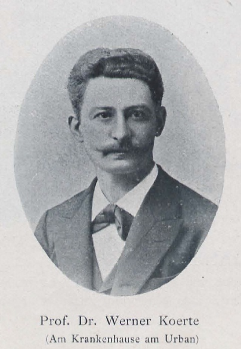 Werner Koerte [oder Körte] (1853-1937), deutscher Mediziner, leitender Arzt im Krankenhaus Am Urban in Berlin-Kreuzberg.